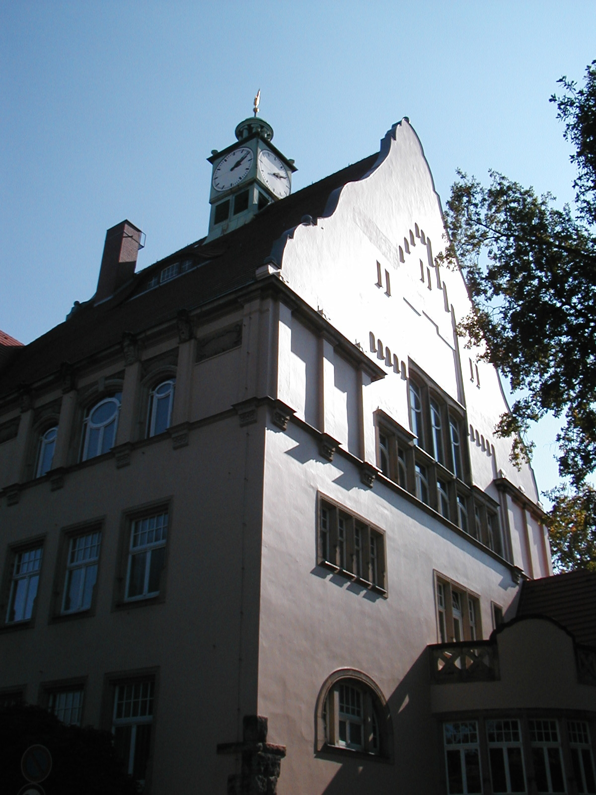 Radebeul Steinbachhaus